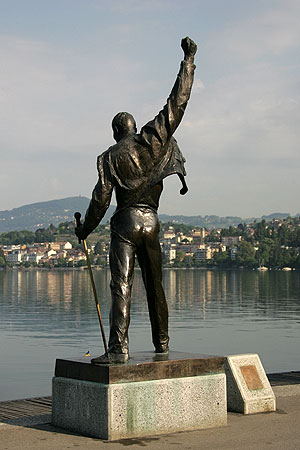 Memorial Freddie Mercury à Montreux